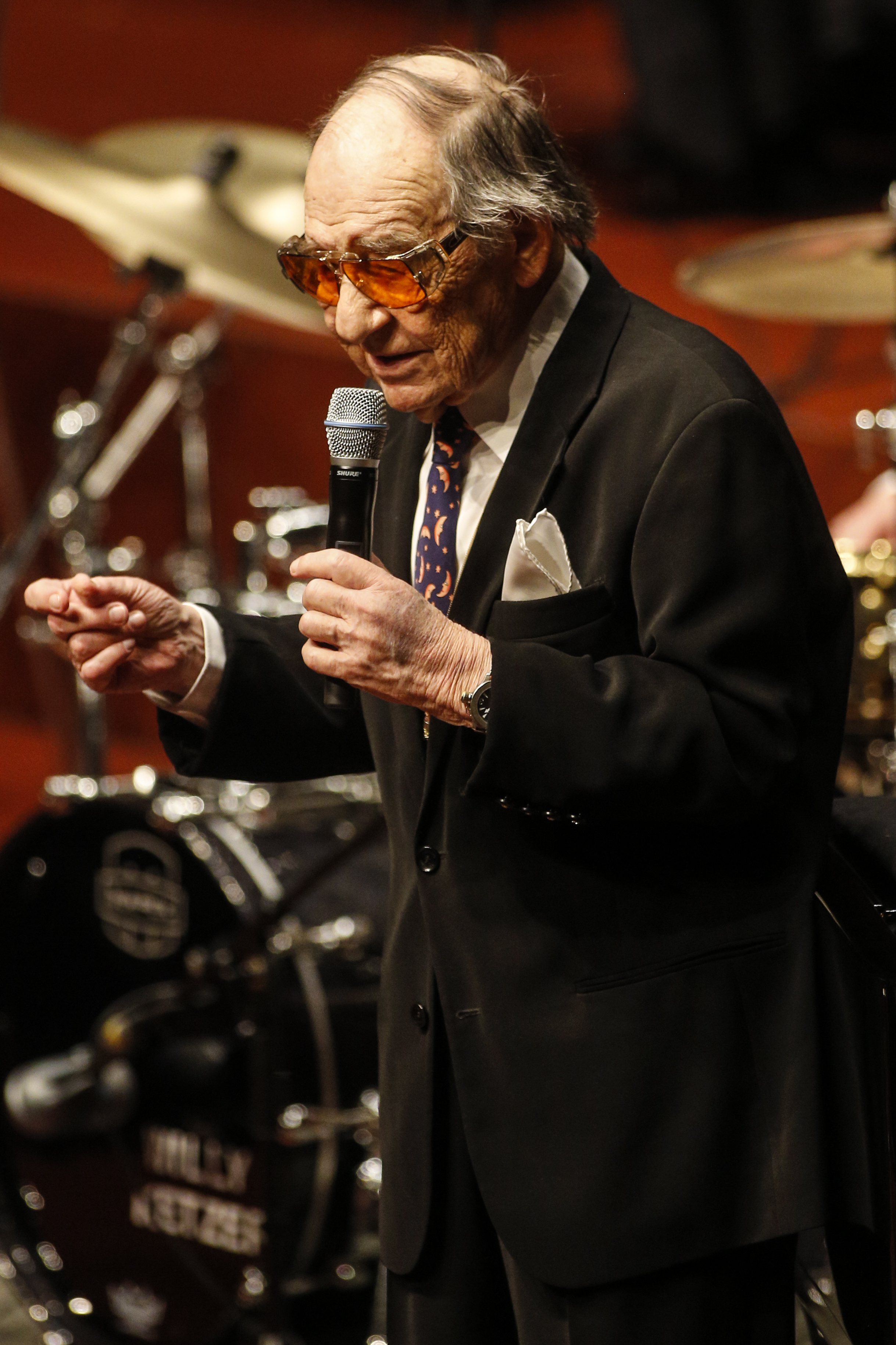 Der deutsche Pianist, Sänger und Bandleader Paul „Paulchen“ Kuhn. Anlässlich seines 85-jährigen Geburtstags gab er am 10. März 2013 ein Geburtstagskonzert in der Alten Oper in Frankfurt am Main. In der Nacht vom 22. auf den 23. September 2013 ist Paul Kuhn verstorben.